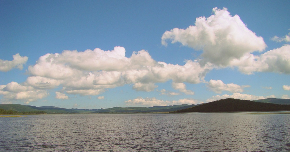 Горное озеро Таглей. Забайкалье, Бурятия, Джидинский район, этнопоселение Улзар.